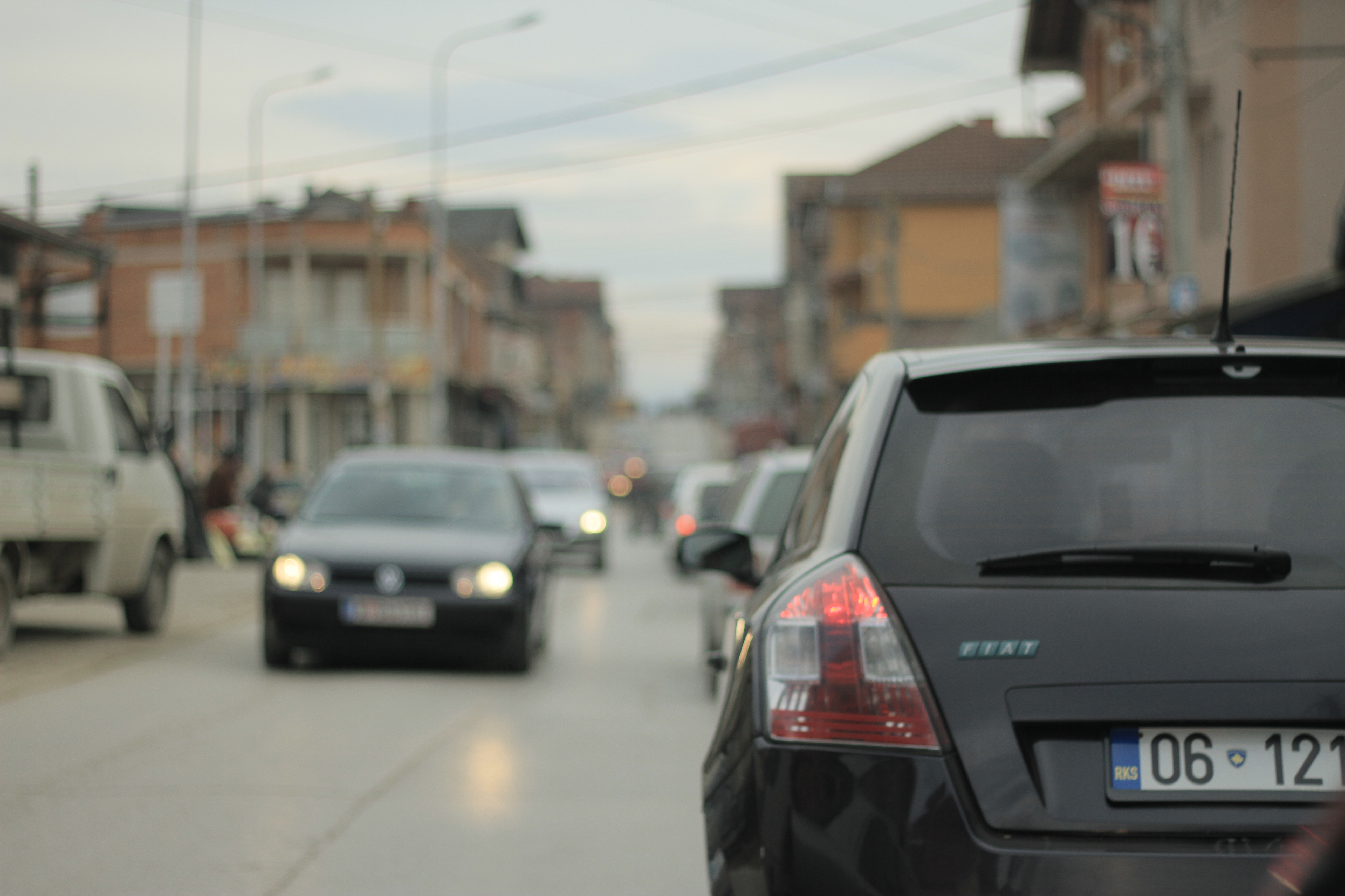 06 Fotografi profesionale